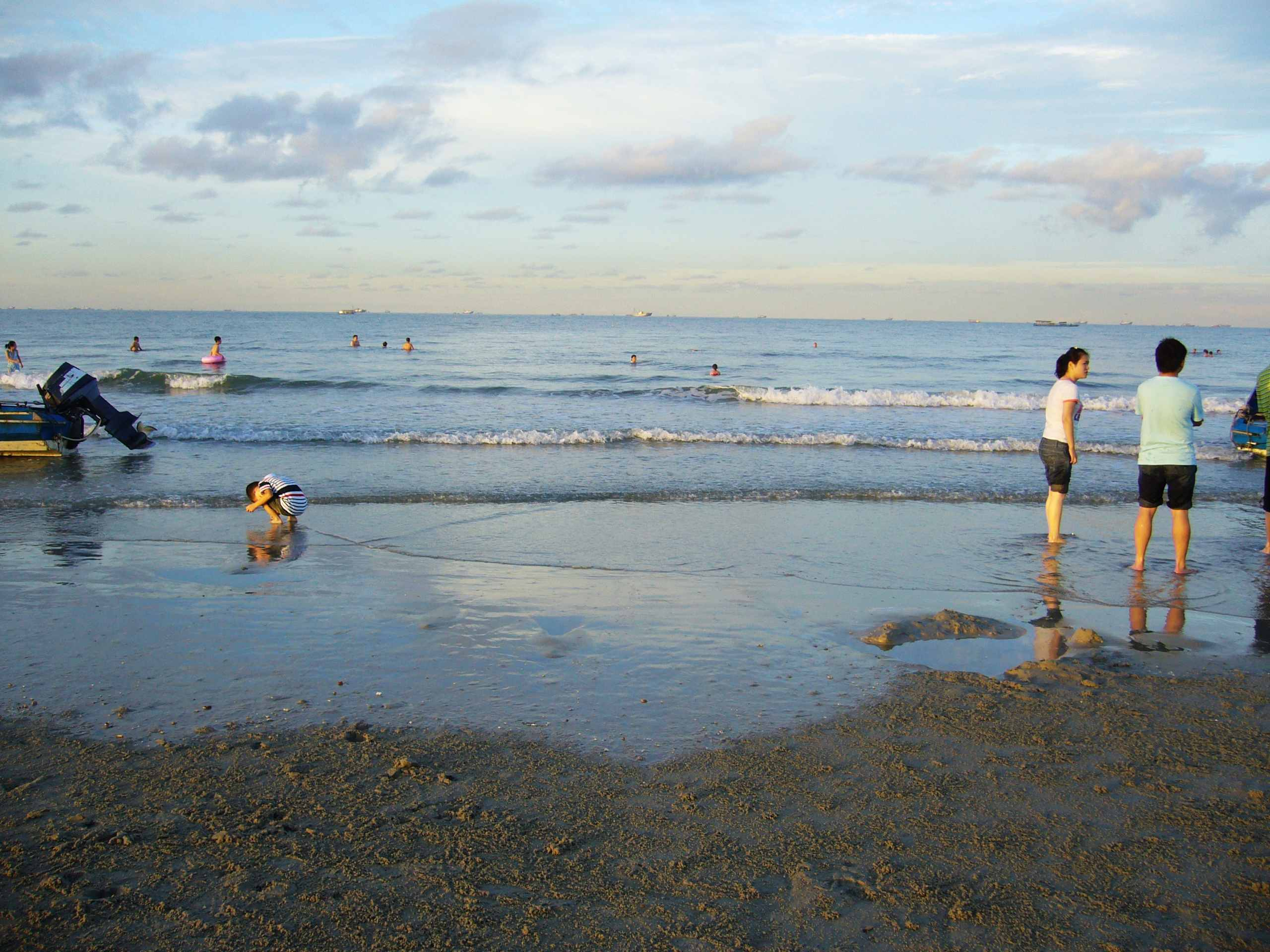 早晨赶海的人